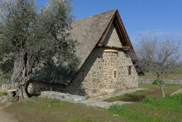 Panagia Podithou in Galata, Zypern.